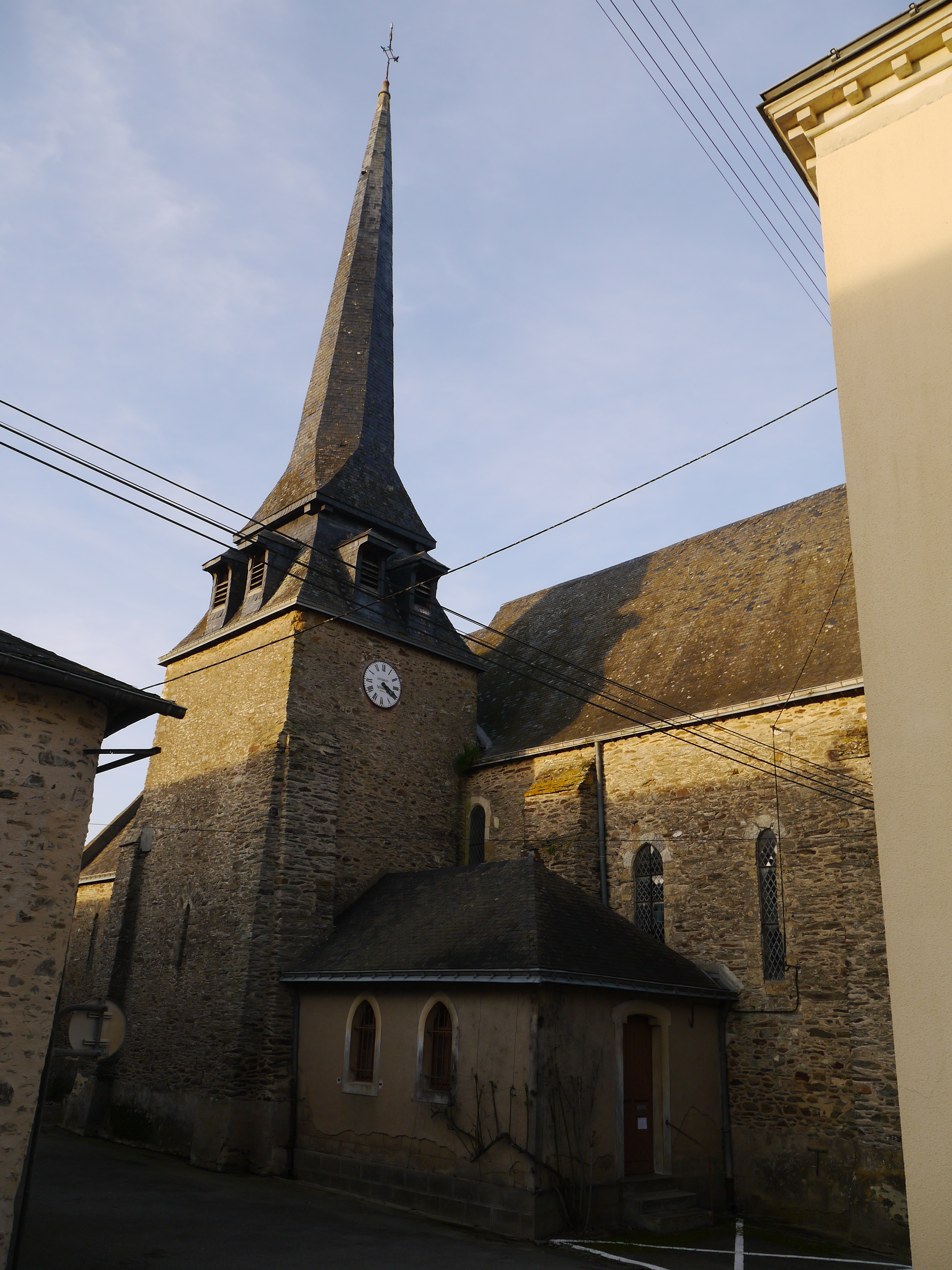 L'église Saint-Maurice.